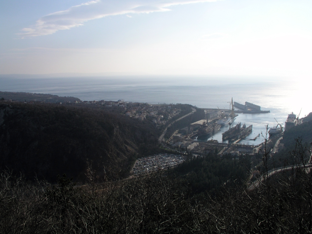 Vrh Martinšćice, Kostrena, brodogradilište Viktor Lenac, Hrvatska